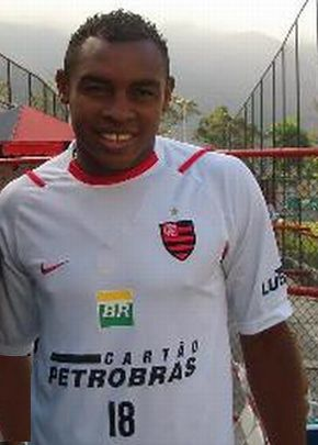 (portuguese) O futebolista brasileiro Obina (Flamengo, 2008)